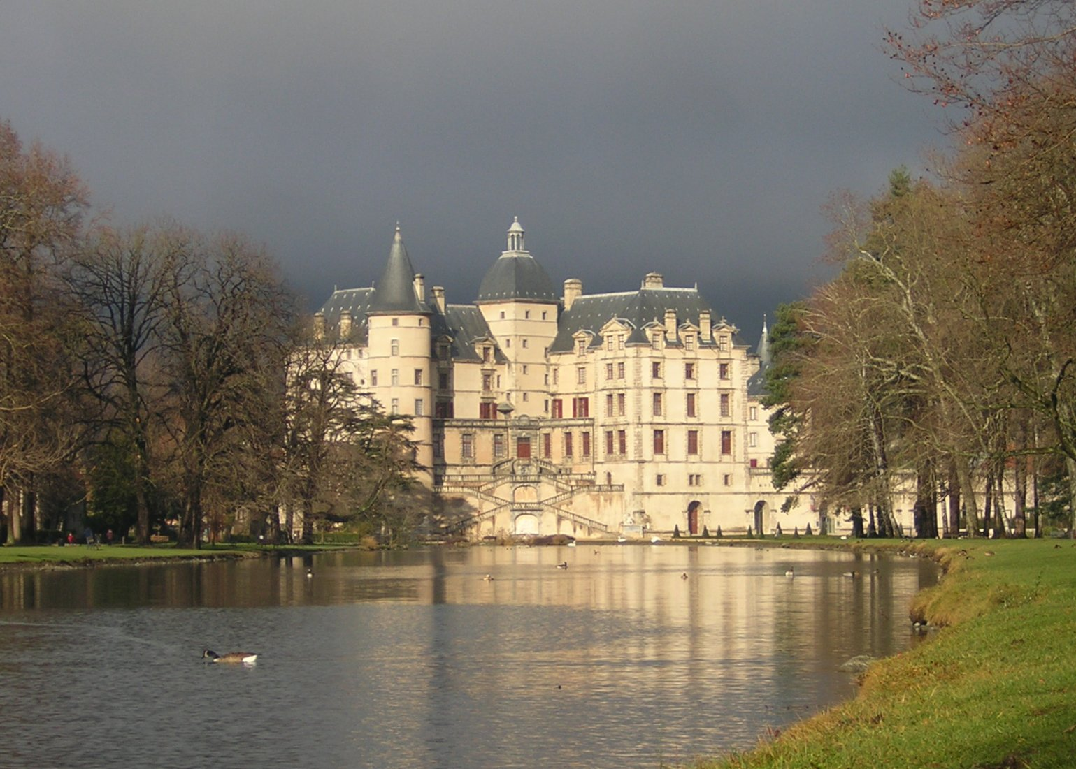 Château de Vizille, vue du Parc du château. Isère (38) France.